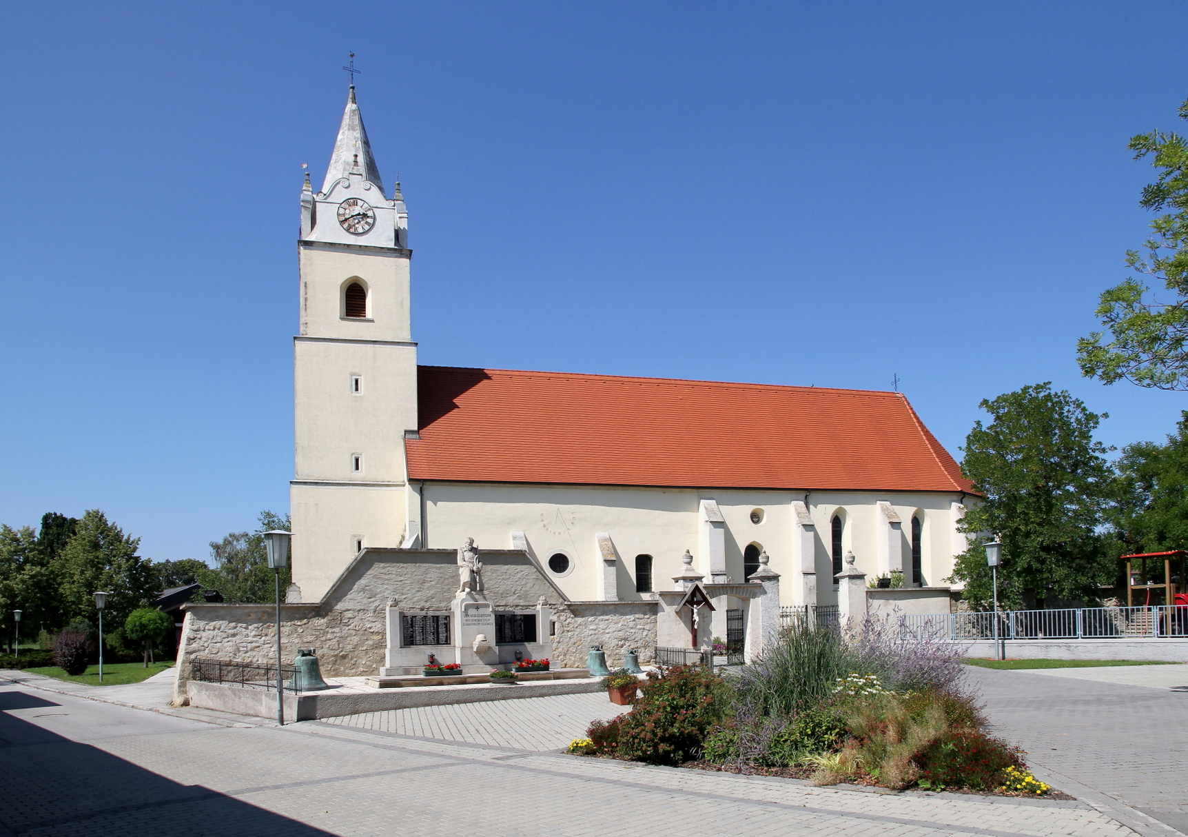 Die kath. Pfarrkirche Mariae Himmelfahrt in der burgenländischen Marktgemeinde Oslip.